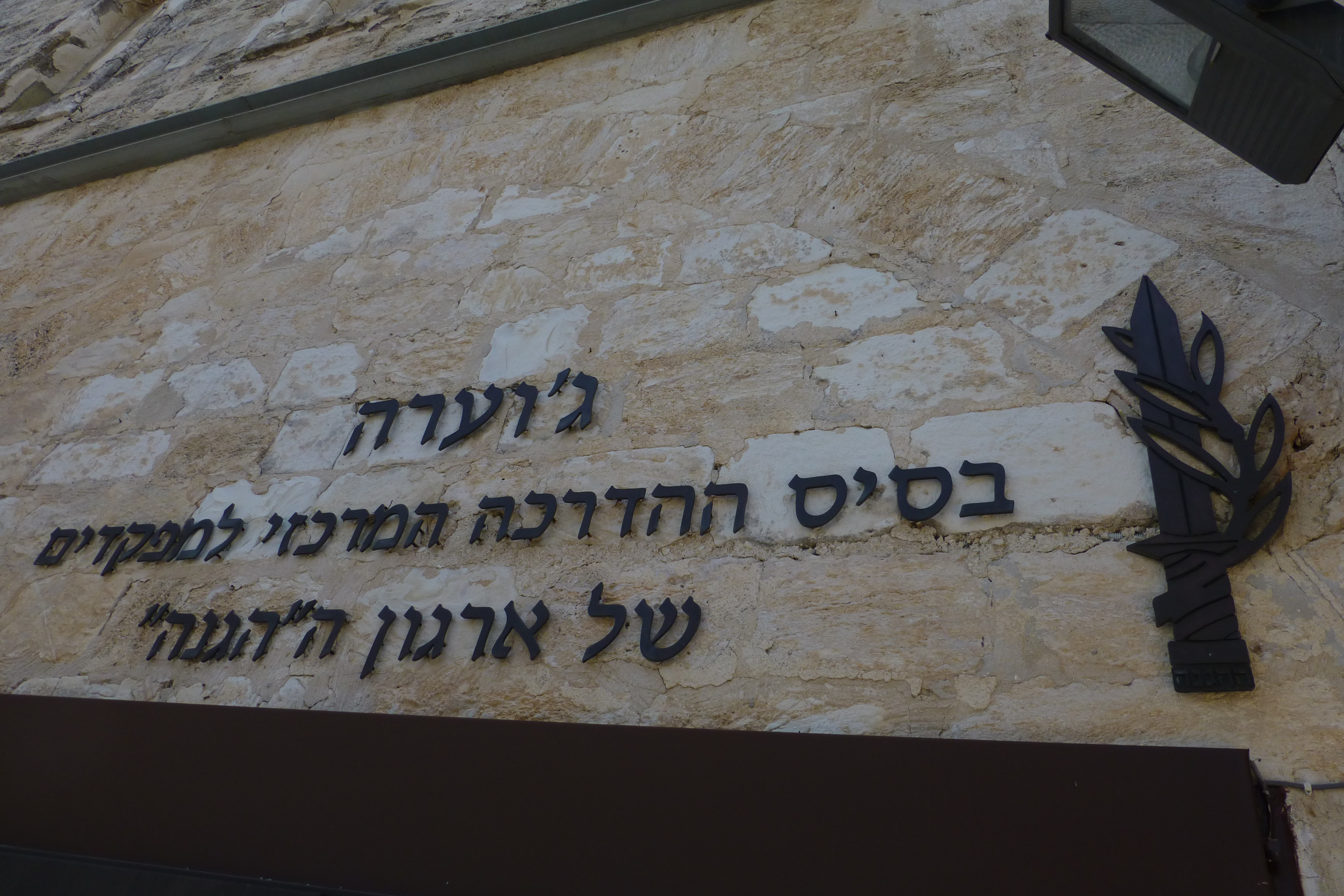 ג'וערה הוא בסיס גדנ"ע ומוזיאון הנמצאים על גבעה ברמות מנשה, במיקום היסטורי ששימש בעבר כבסיס ההדרכה המרכזי למפקדים של ארגון "ההגנה". שמה העברי של הגבעה הוא "גבעת נֹח".